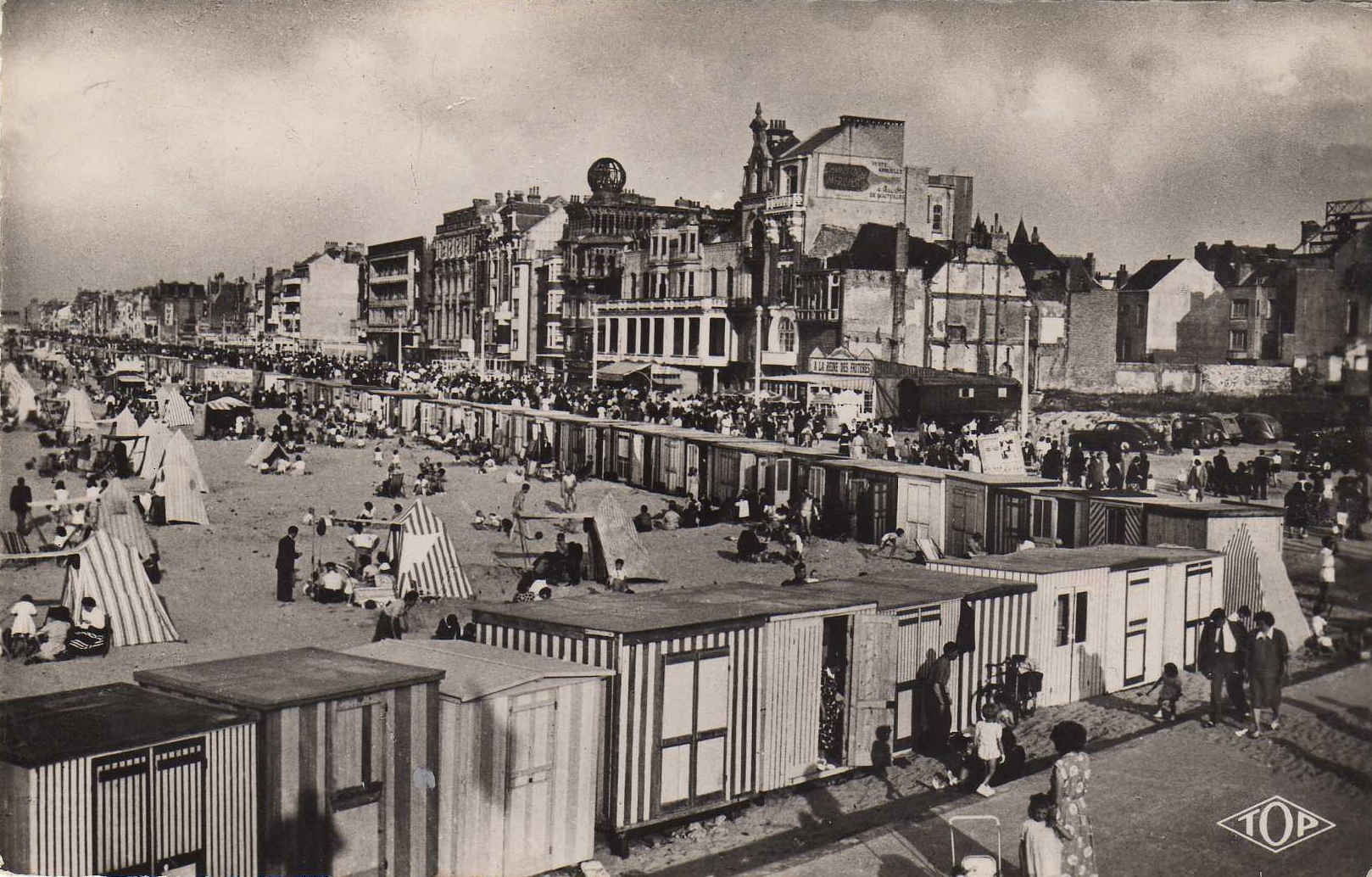 Carte Postale de la digue de Malo-les-Bains (Nord, France).